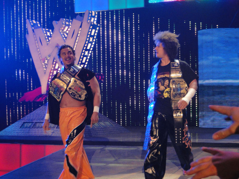 Los campeones en parejas unificados Los Colones